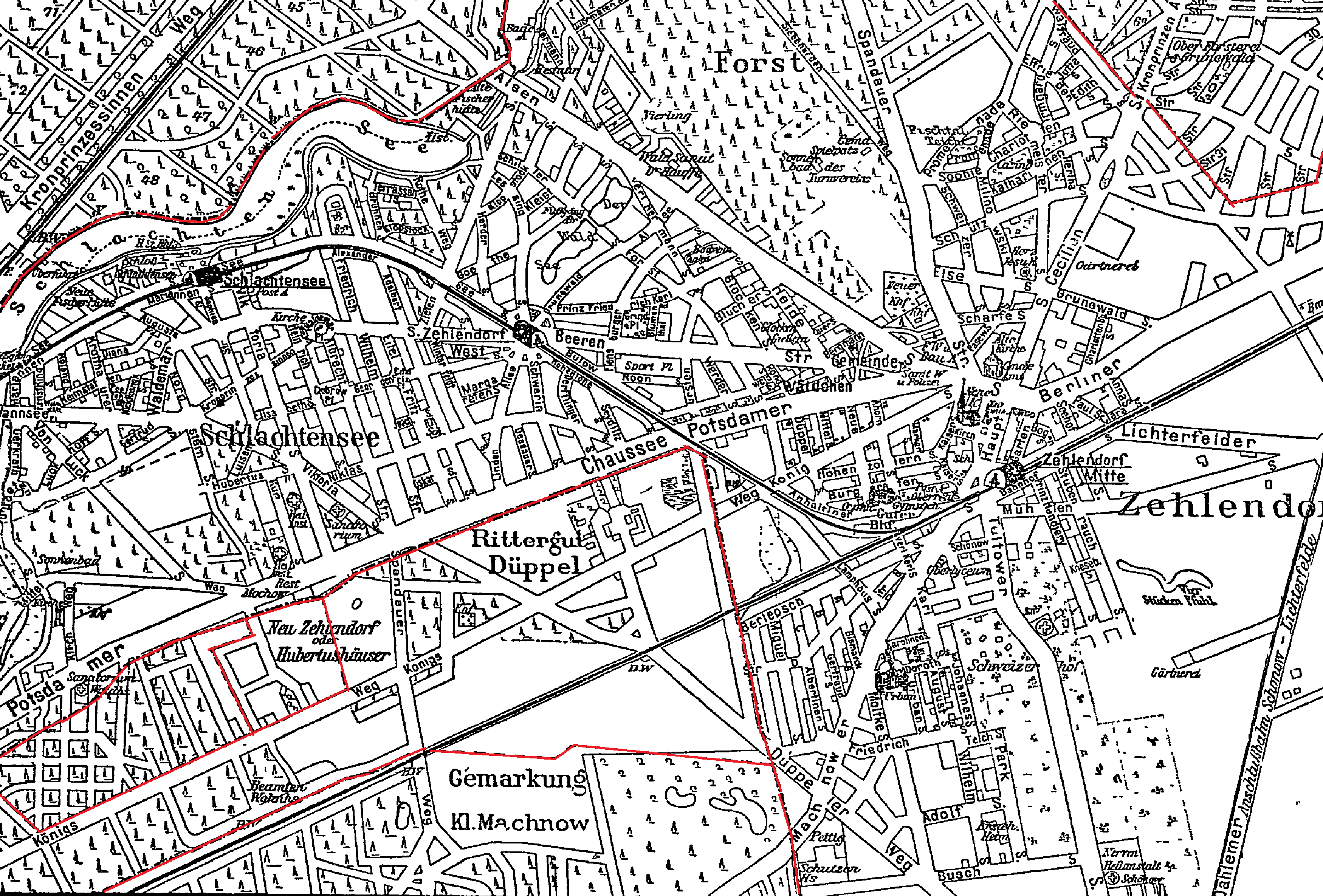 Zehlendorf mit Schlachtensee nach der Karte im Berliner Adressbuch von 1920, Teil V, Seite 852 (Situation noch vor der Bildung von Groß-Berlin im Lauf des Jahres 1920) - nachkolorierte Ortsgrenzen